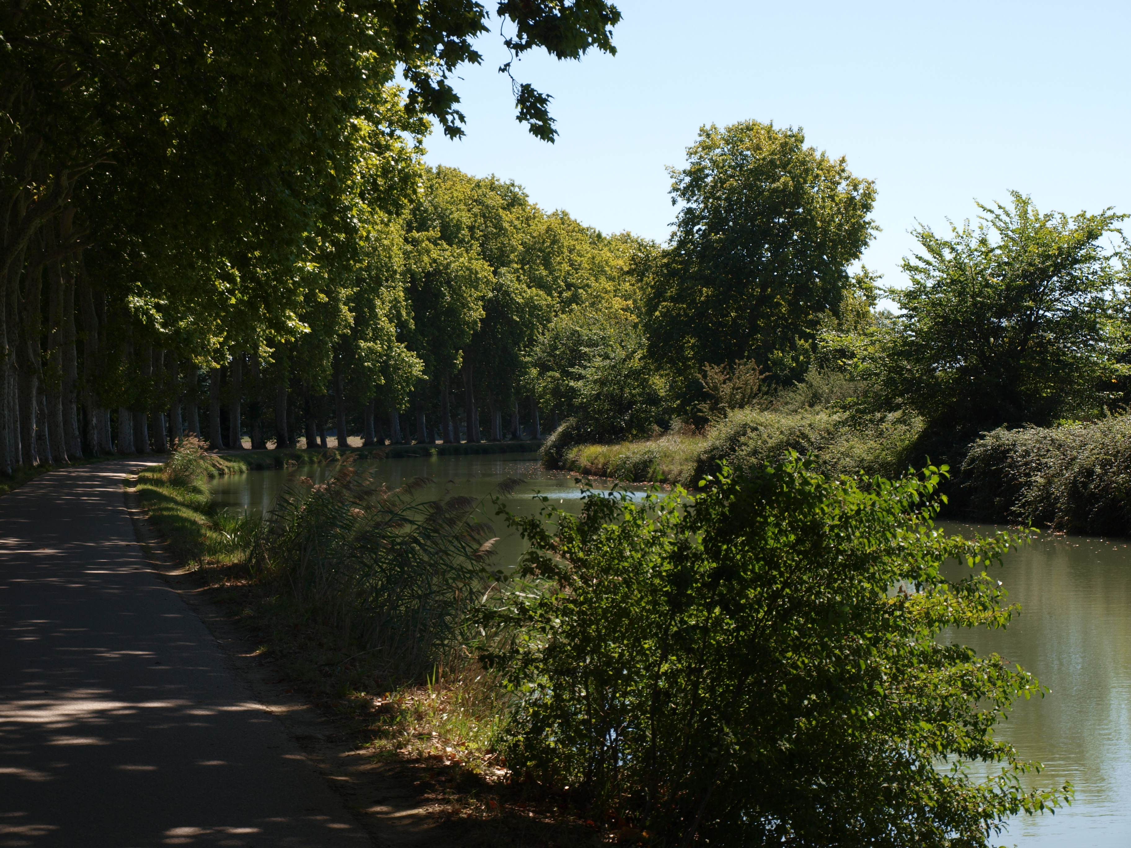 Un autre monument, Canal du Midi